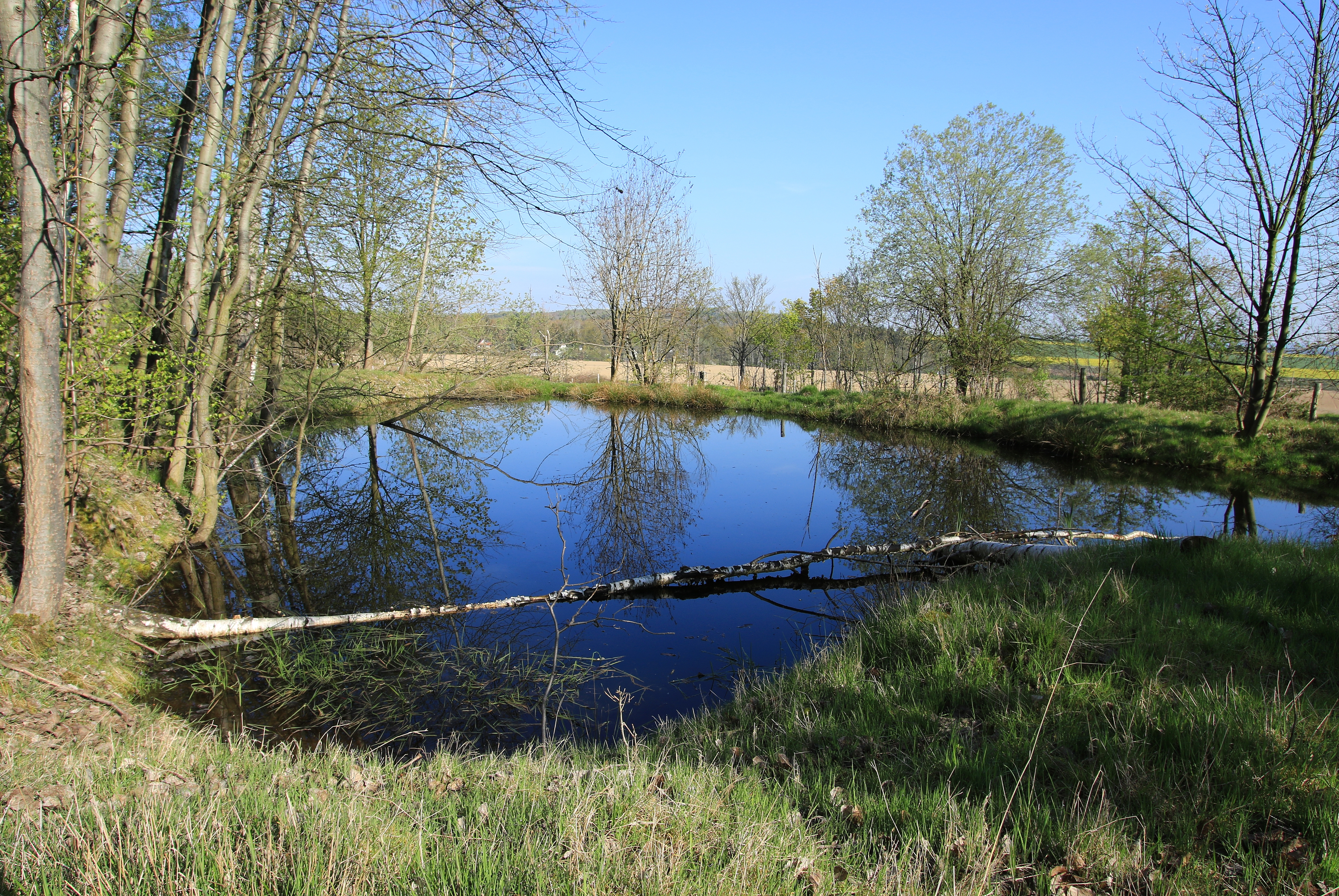 Ein Stillgewässer (nicht der namensgebende Eibsee) im Naturschutzgebiet „Um den Eibsee“ (NSG C 89), Stadt Chemnitz, Naturraum Mittleres Erzgebirge.